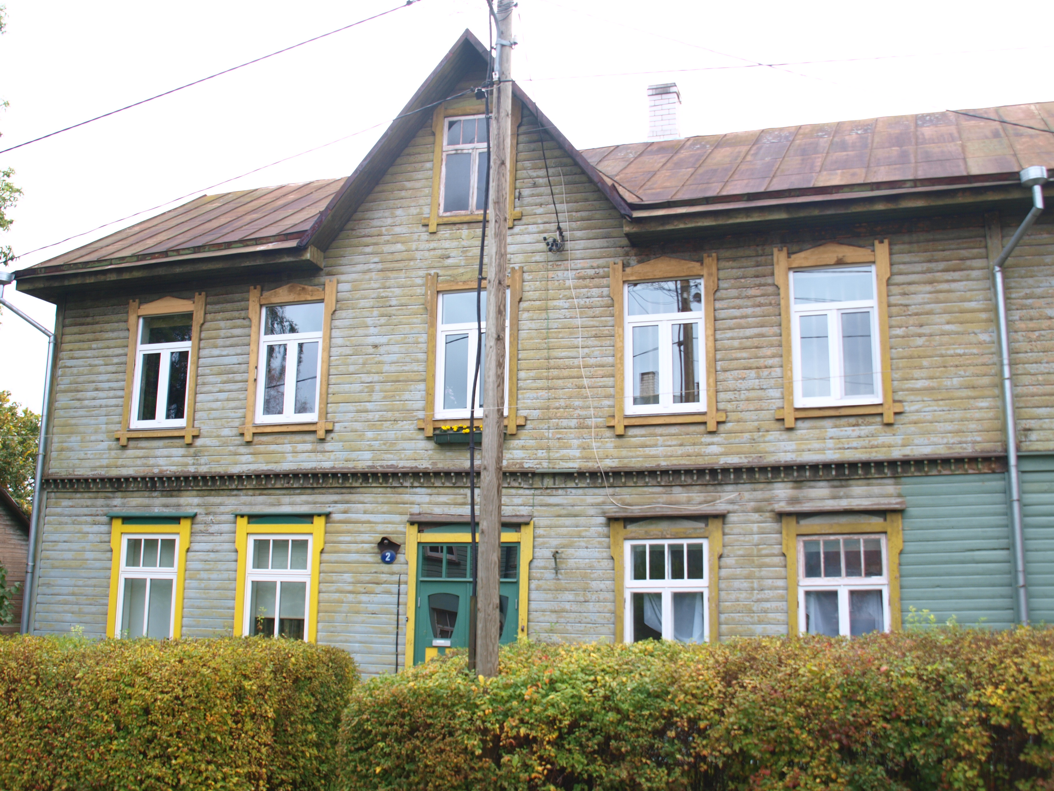 Puitelamu Tartus Marta 2, 1907-1914.a.